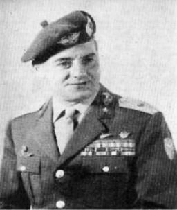 Il generale di Brigata Aldo Magri ai tempi in cui era comandante della Brigata paracadutisti Folgore